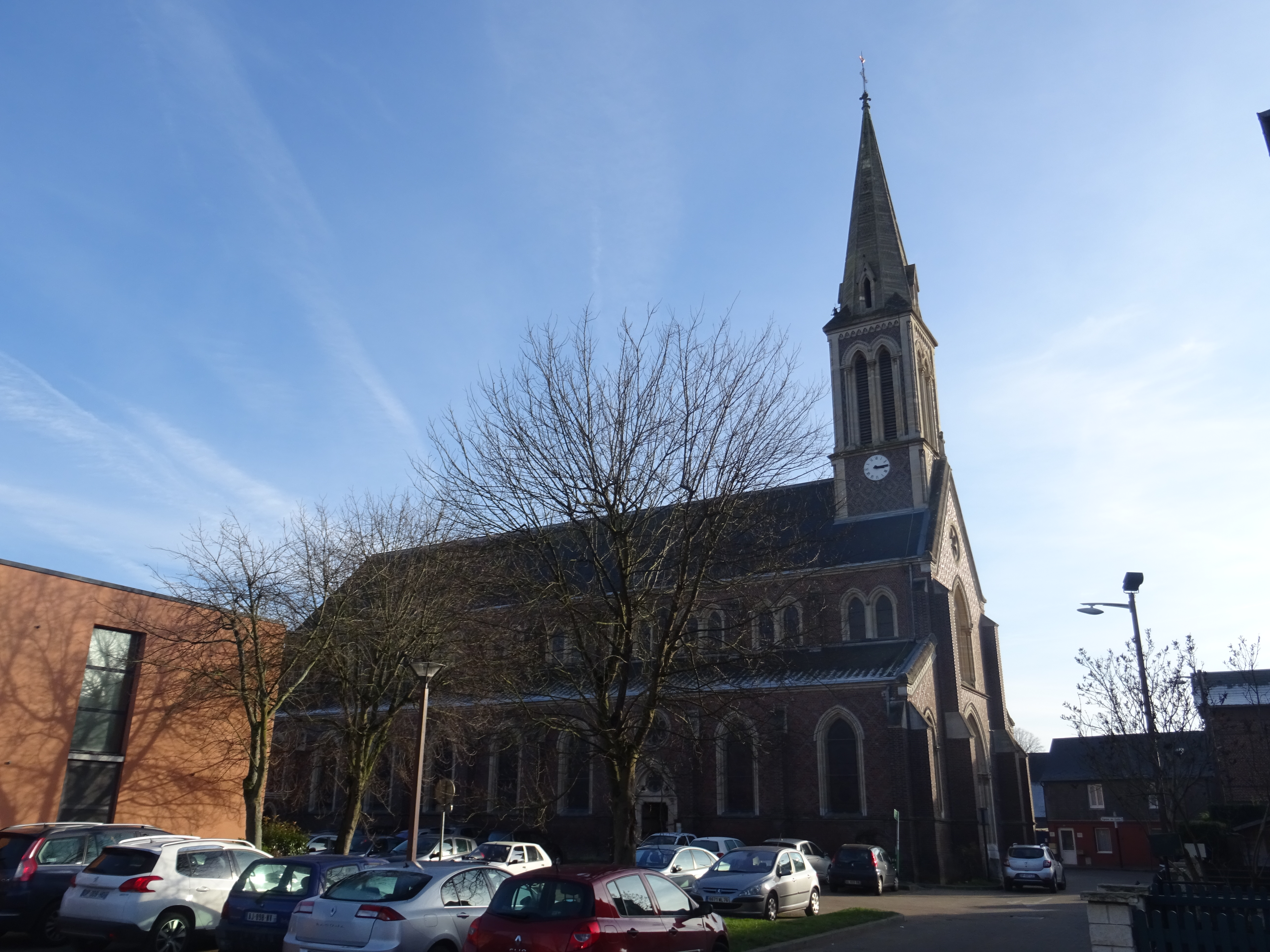 Eglise Saint-Martin de Maromme